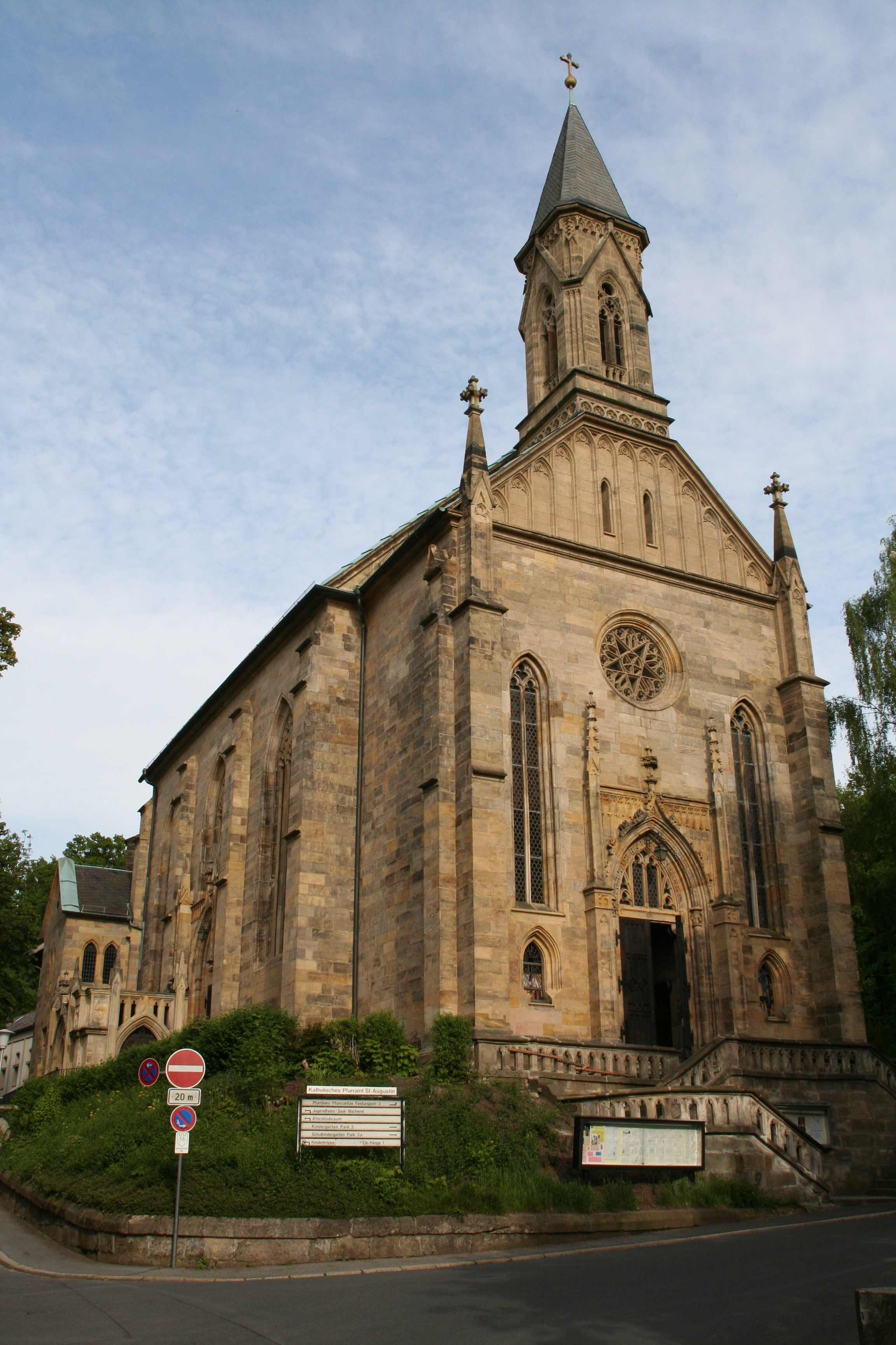 Kirche St. Augustin, Coburg Festungsstraße 1Kirche St. Augustin in Coburg